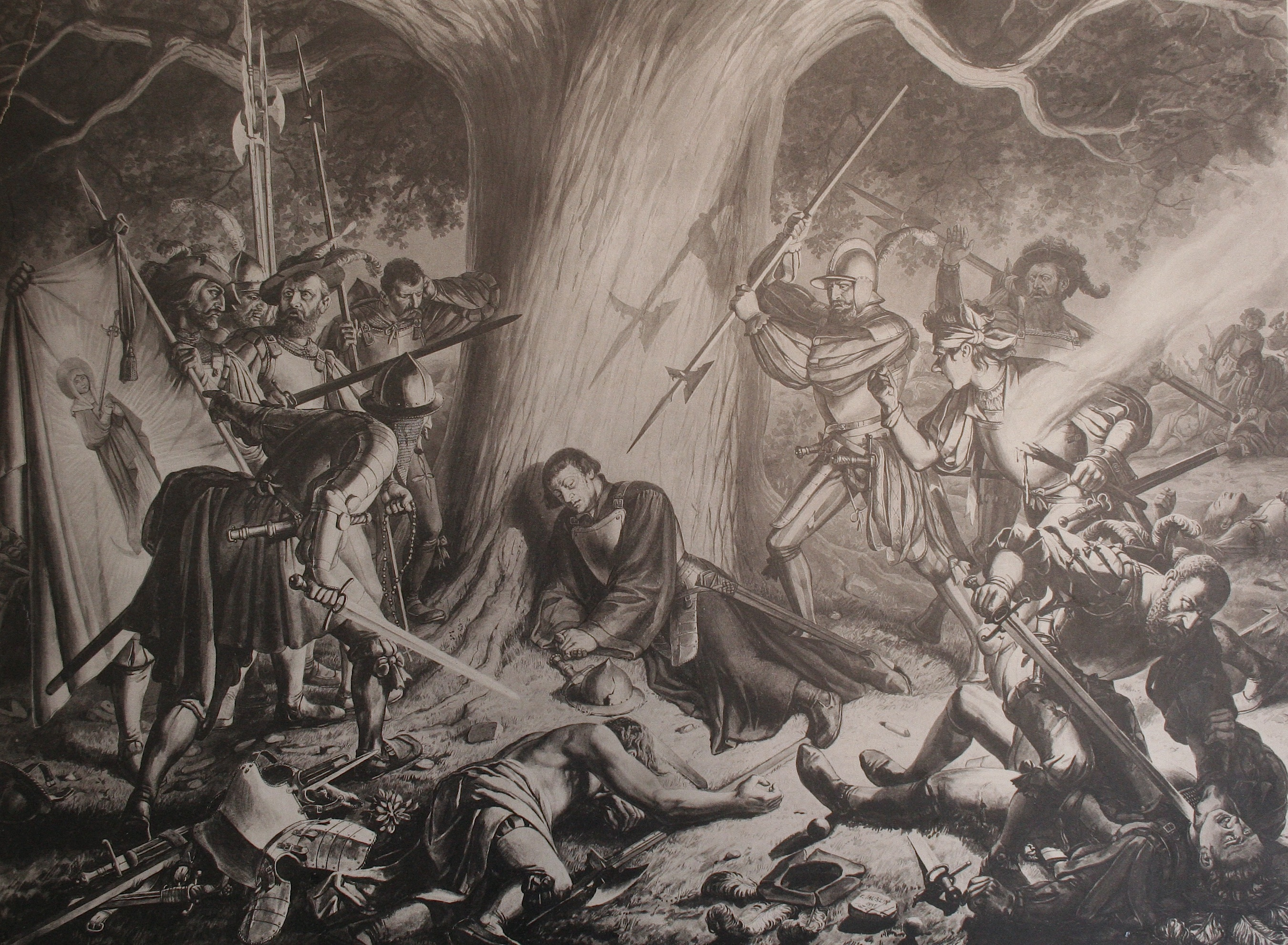 Die Ermordung von Ulrich Zwingli, 11. Oktober 1531